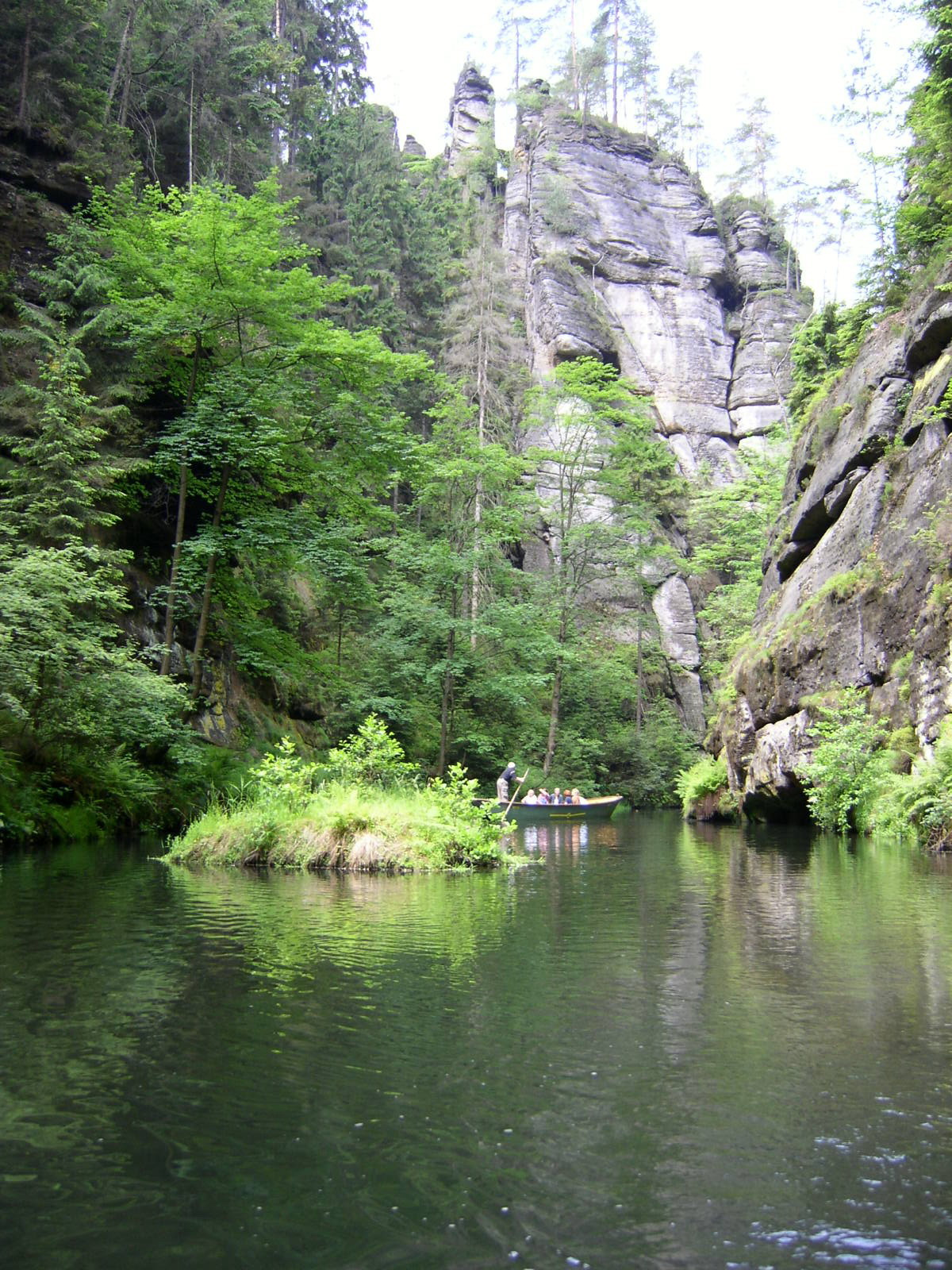 Kamnitzschlucht/Kamnitzklamm Böhmische Schweiz von Thomas Schaffhirt.